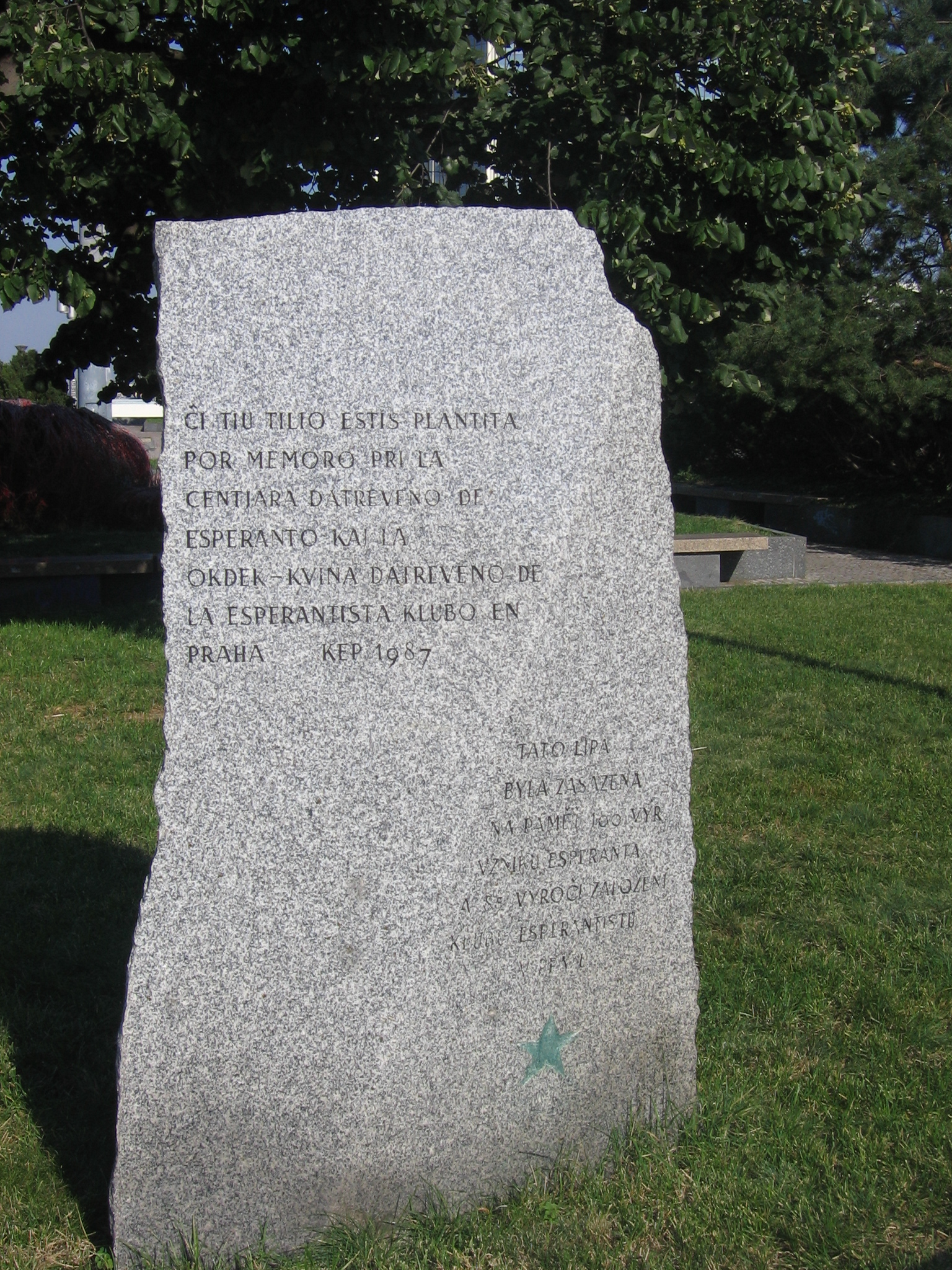 Monumento omaĝe al 85 jaroj de la esperanta klubo en Prago (malantaŭ ĝi estas tilio) kaj 100 jaroj de esperanto